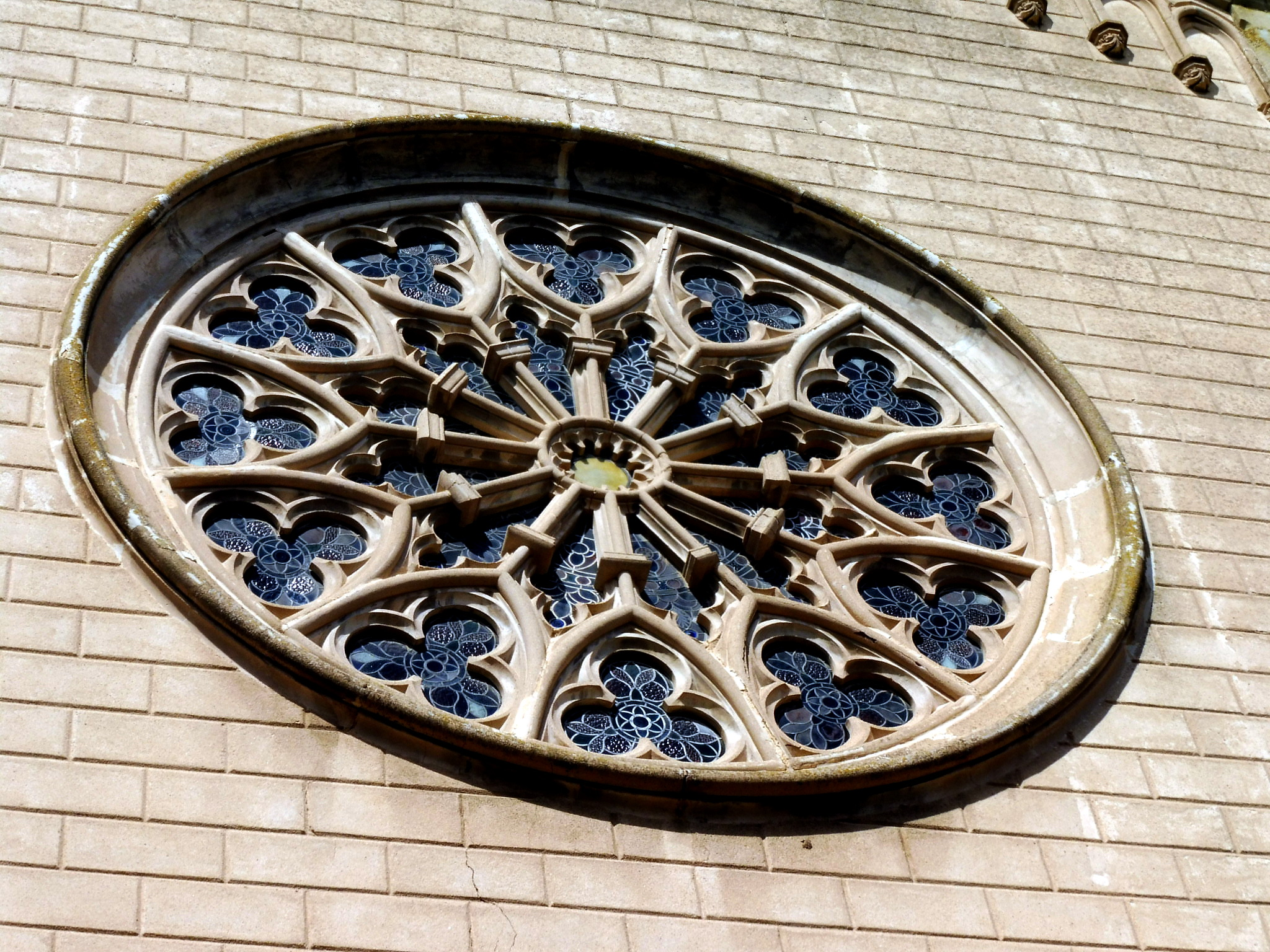 Església Missioneres (Cervera): rosassa